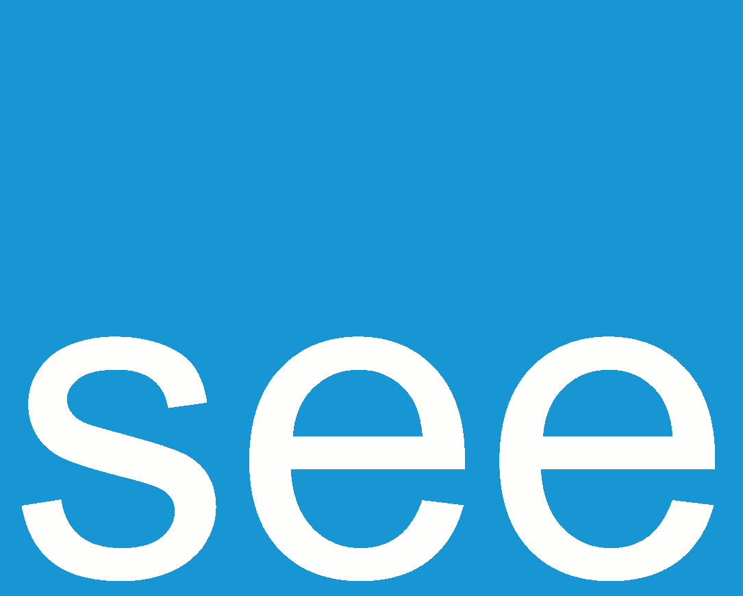 Logo der Internationalen Bauausstellung (IBA) Fürst-Pückler-Land